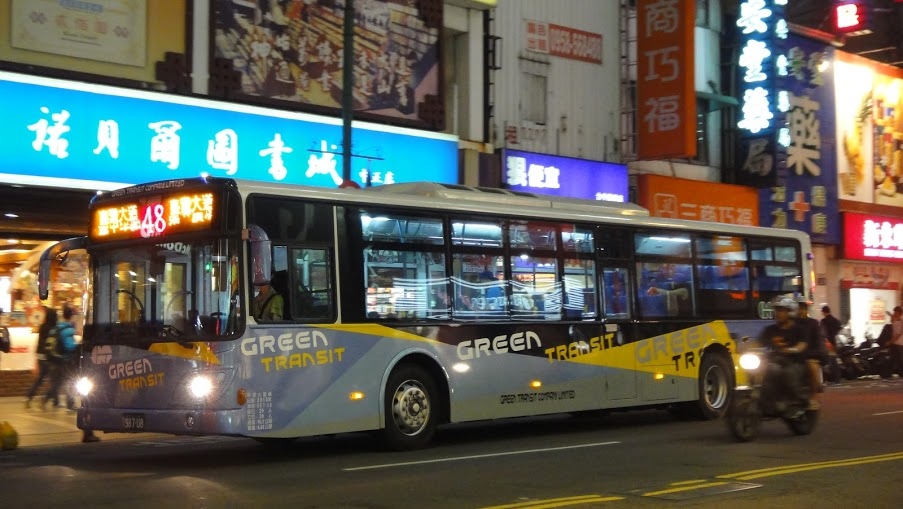 豐榮客運2015年大宇MB120NS大客車987-U8夜景。